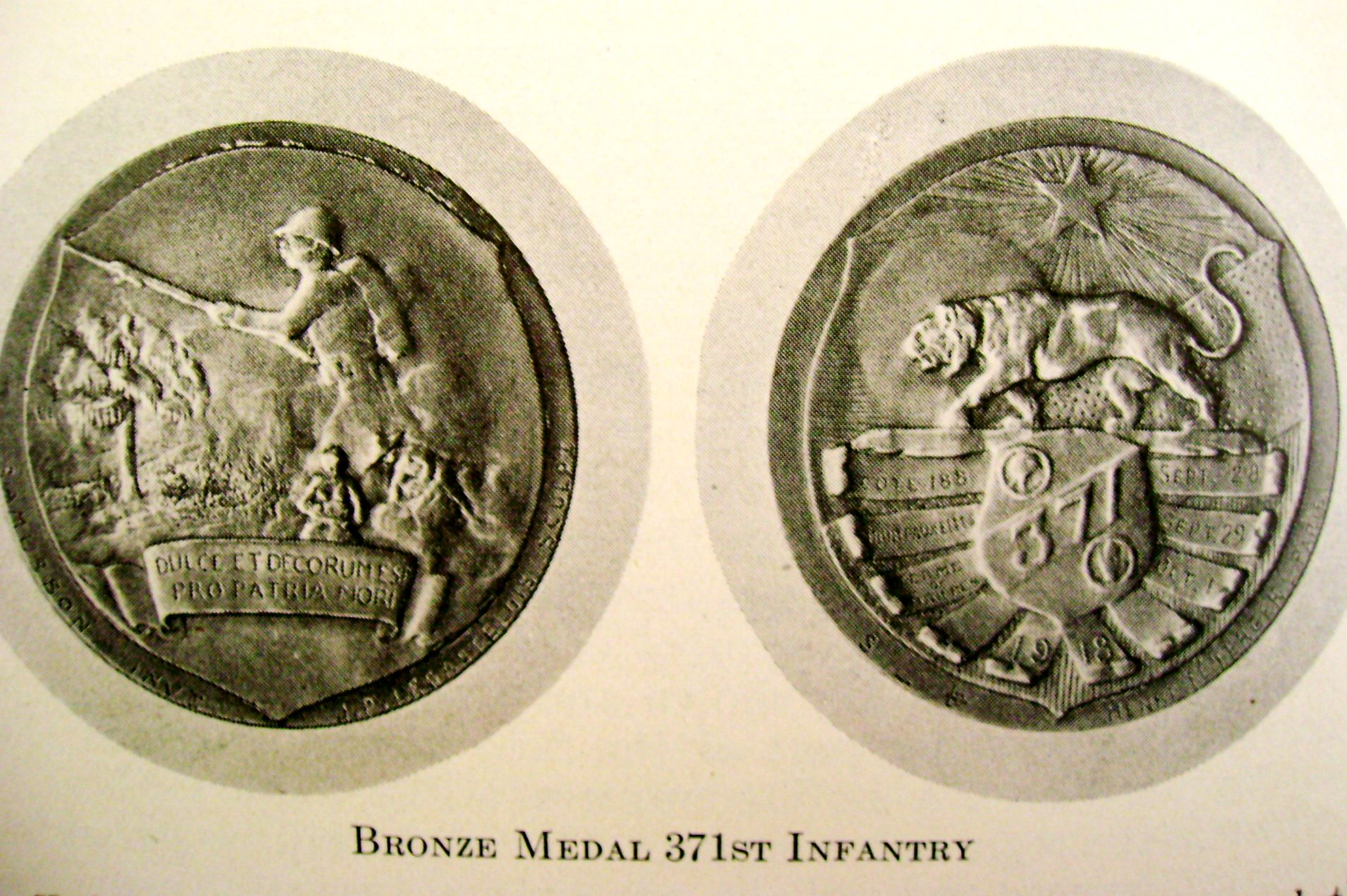 Zoom sur un détail du livre de chester D. Heywood de 1928. The negro troops in the world war . Sur la droite les faits d'armes avec le casque et la main rouge ( Red hand division du general Mariano Goybet)